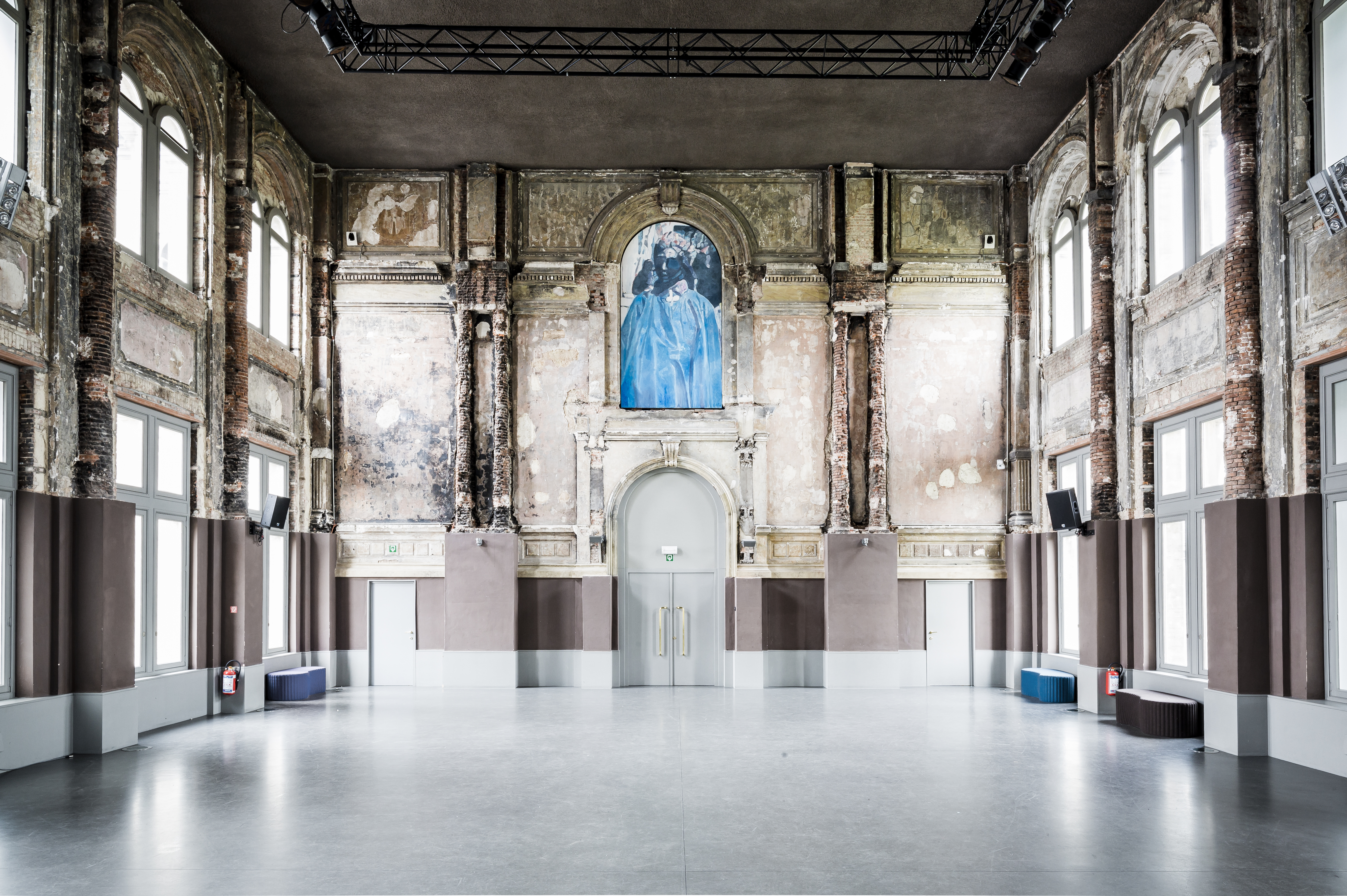 Zaal AthenA in de huidige staat